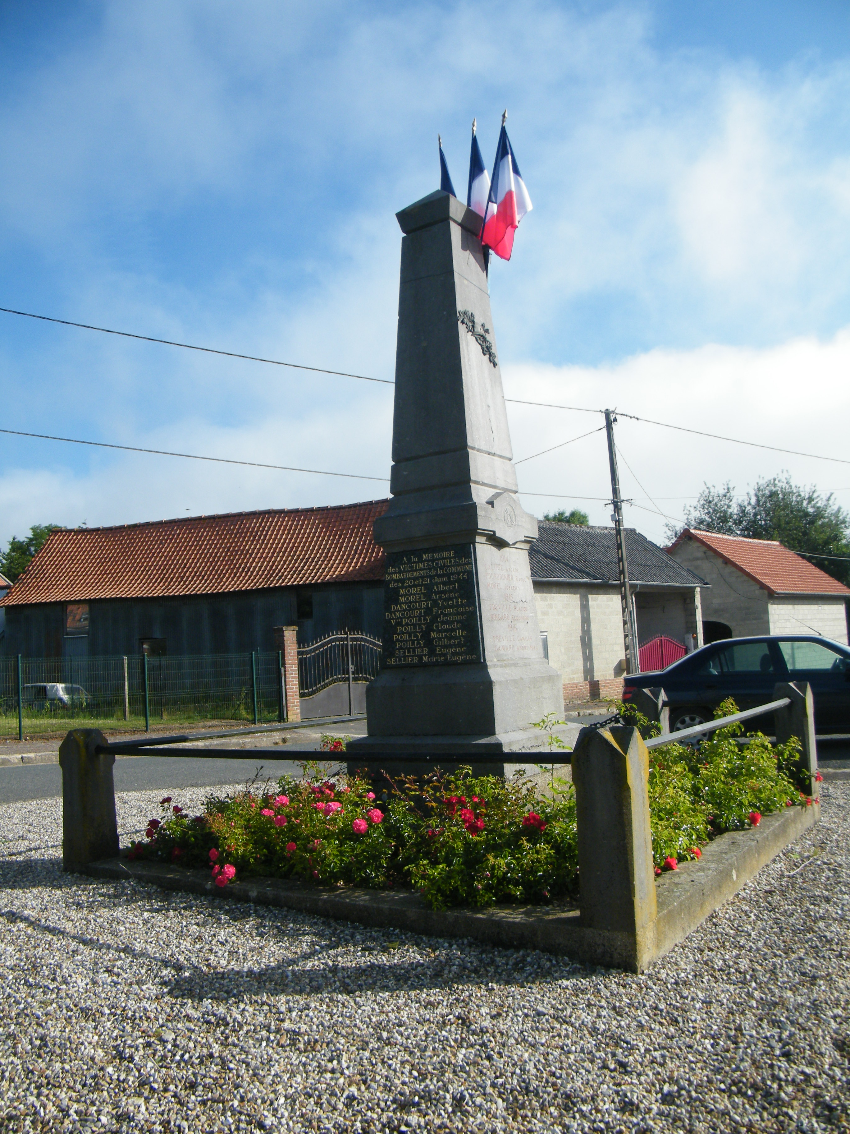 Neuville-au-Bois, Somme, Fr, monument (3)